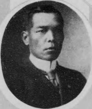 石原健三（1864-1936）